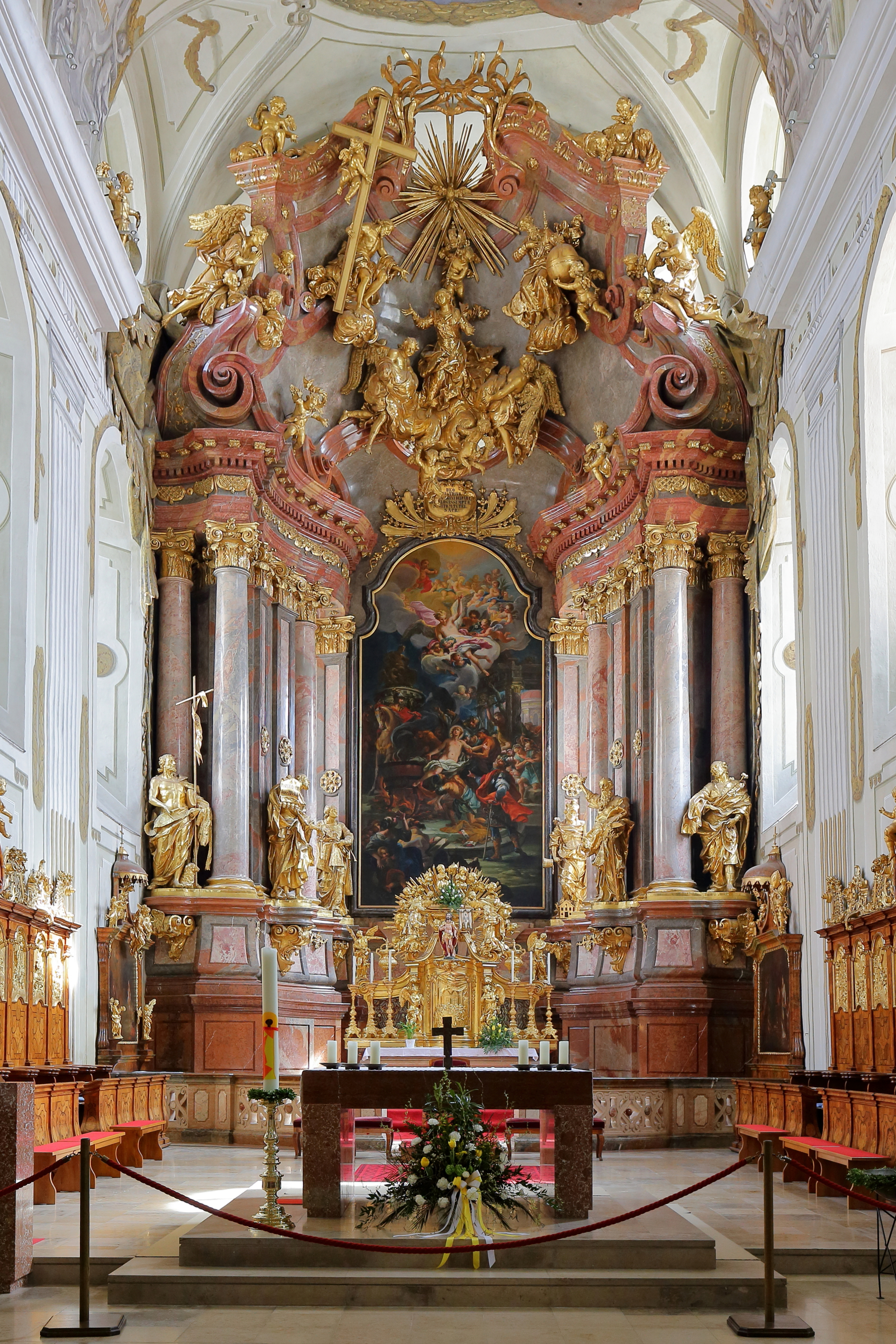 Hochalter der römisch-katholischen Pfarrkirche hl. Veit in der niederösterreichischen Stadt Krems an der Donau.Der Hochaltar ist ein Werk von dem Passauer Bildhauer Joseph Matthias Götz aus dem Jahr 1733. Das rund 8 Meter hohe Altarbild mit dem Thema "Martyrium des hl. Vitus" schuf 1734 Johann Georg (»Wiener«) Schmidt. Die Marmorierungsarbeiten wurden vom Wiener Marmorierer Balthasar Hagenmüller ausgeführt.